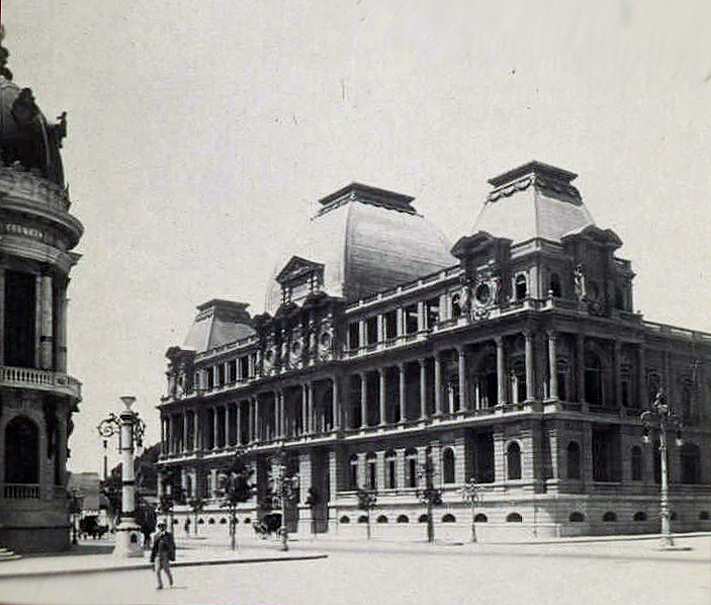 Escola Nacional de Belas Artes, atual Museu Nacional de Belas Artes, Rio de Janeiro.